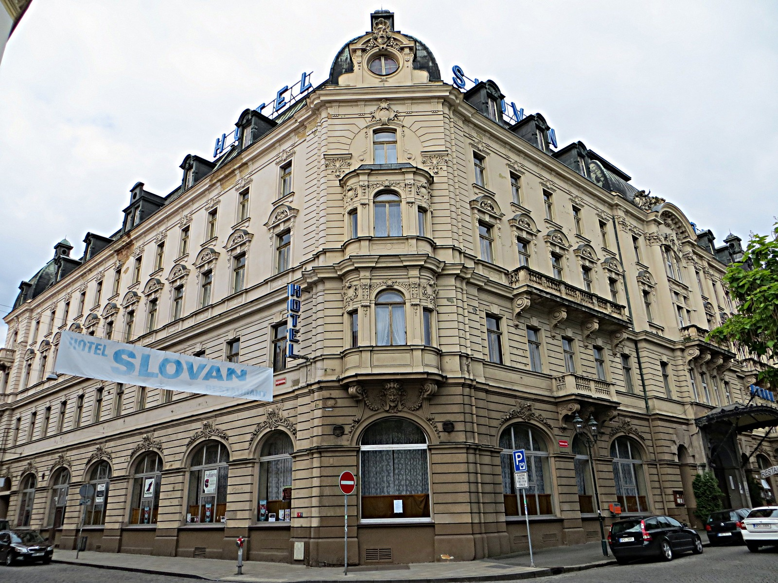 Hotel Slovan